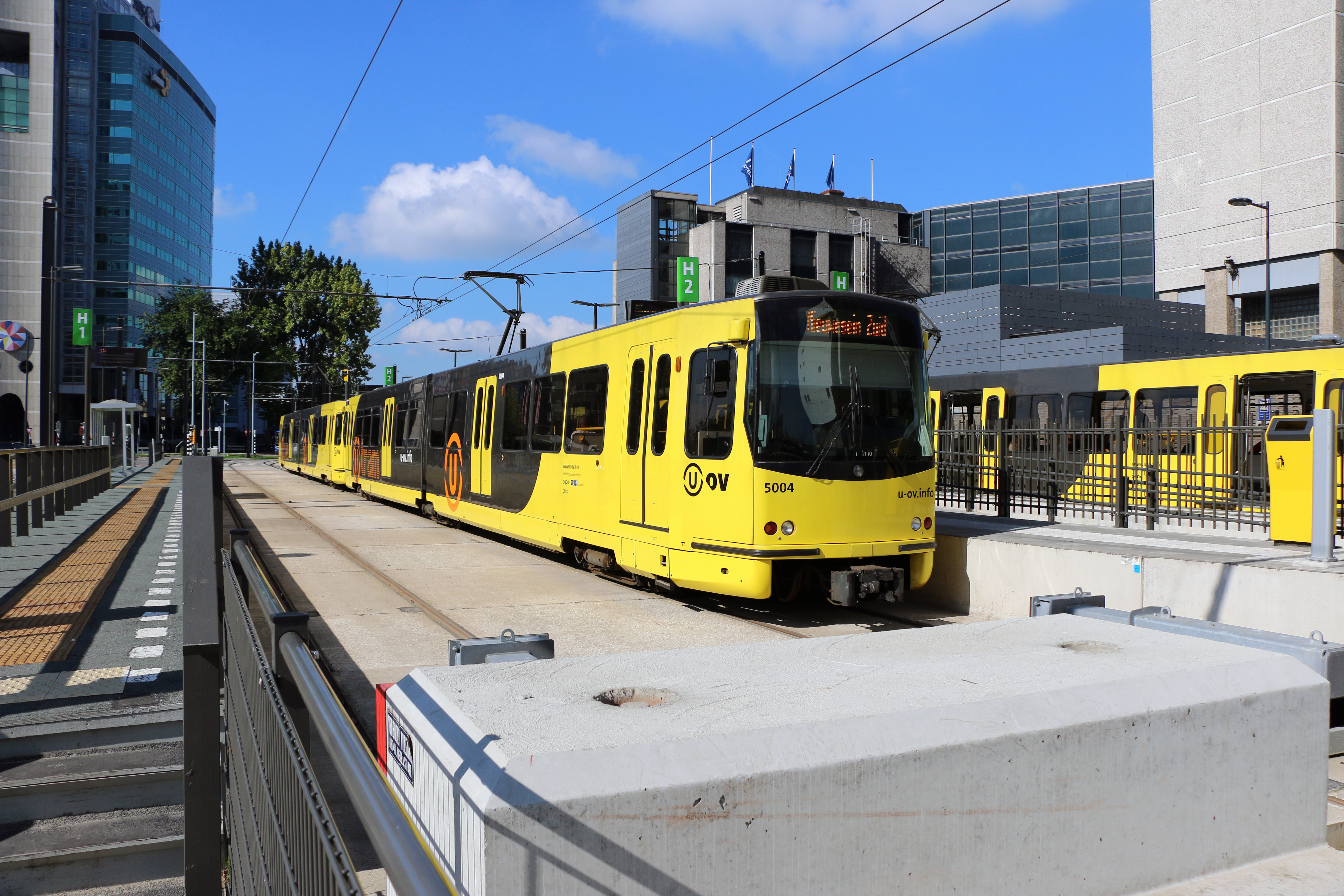 U-OV U-Tram stellen 5004 en 5011, centraal station, Utrecht